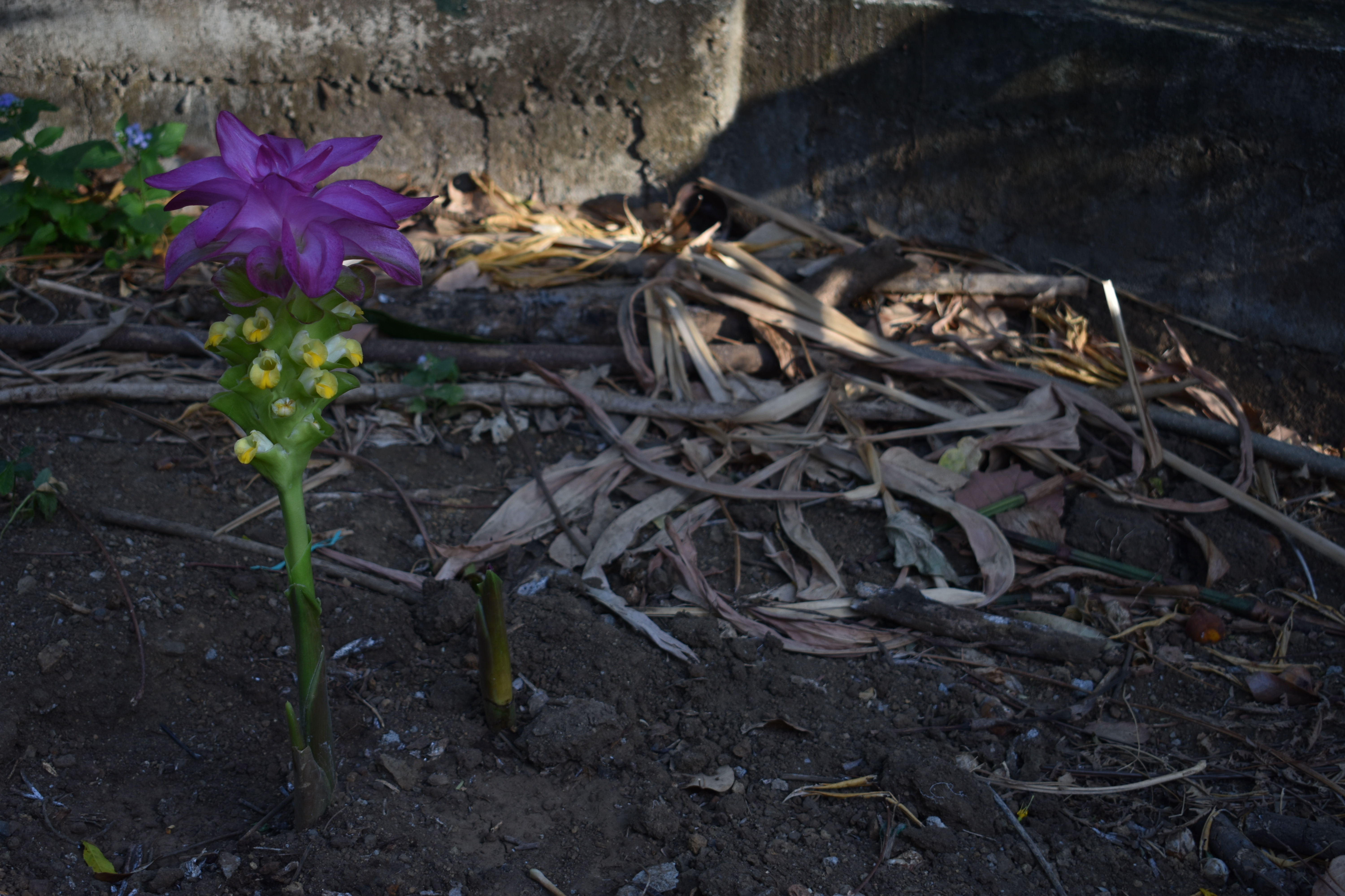 La planta muestra su inflorescencia..